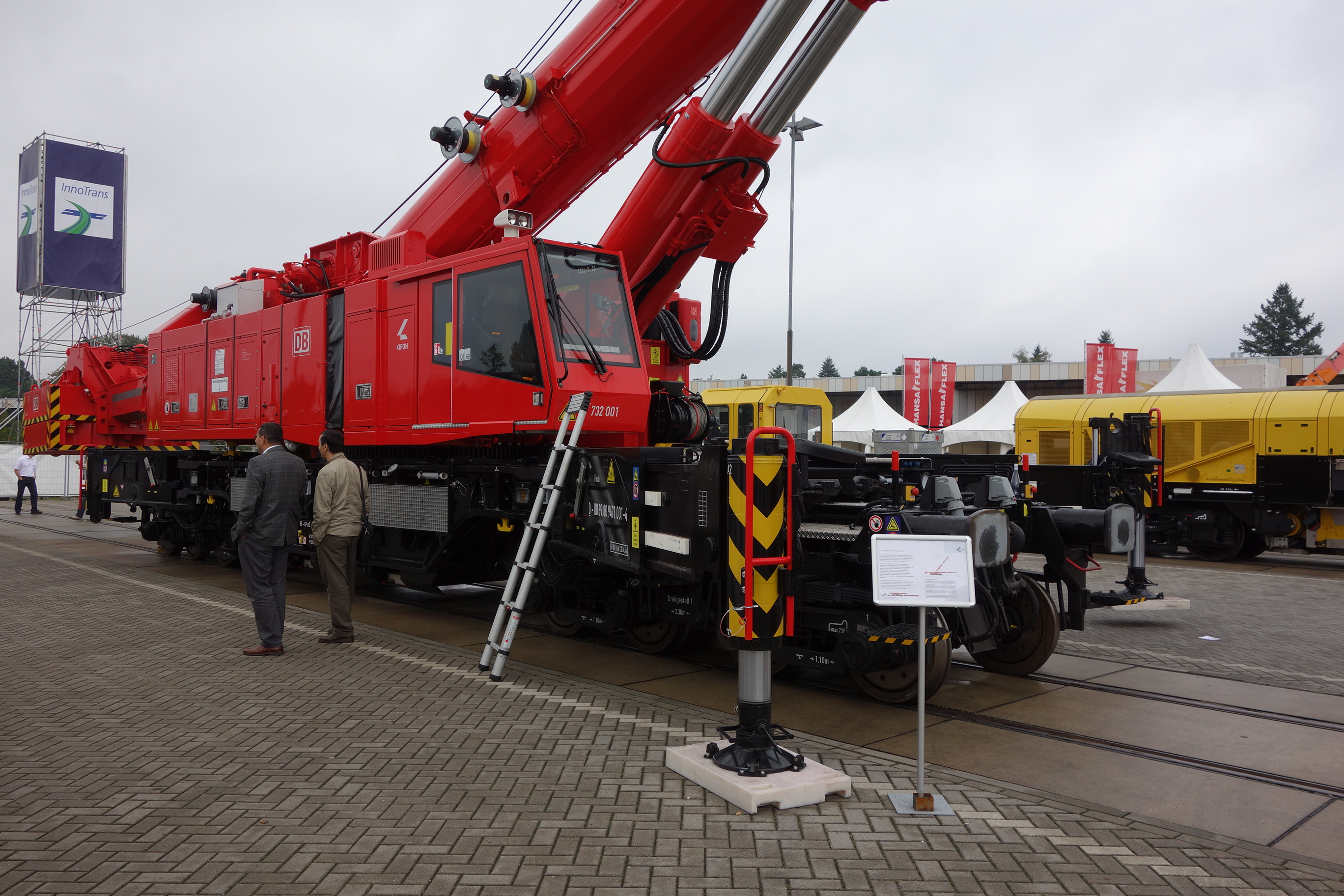 Schienendrehkran (Eisenbahndrehkran) Kirow KRC 1200 (DB-Baureihe 732) auf der Innotrans Berlin 2014